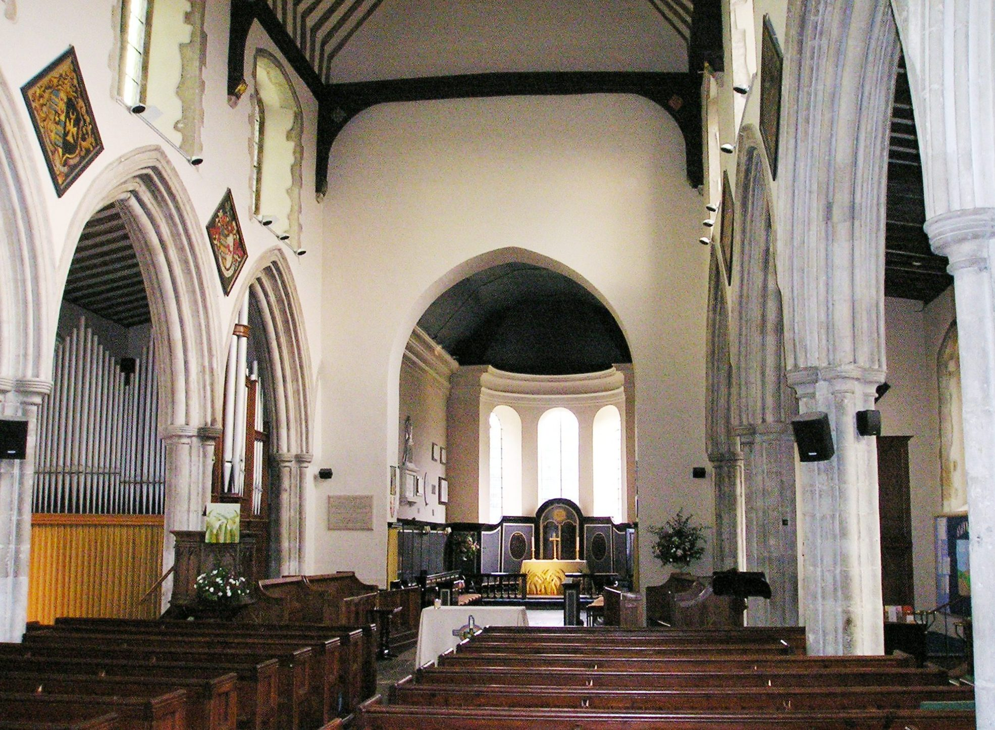 Wye_(Kent)_Church_St_Gregory_and_St_Martin_Innenraum